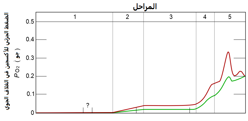 رسم بياني لمراحل تشكل غاز الأكسجين O2 في الغلاف الجوي للأرض، يمثل الخط الأحمر القيم التقديرية العظمى لضغط الأكسحين الجزئي في الغلاف الجو، في حين أن الأخضر يمثل القيم التقديرية الدنيا. المراحل: 1) لا يوجد إنتاج لغاز الأكسجين O2 في الغلاف الجوي للأرض؛ 2) إنتاج لغاز الأكسجين O2، لكن الكمية المنتجة تمتص في المحيطات؛ 3) بداية تحرر كميات من الأكسجين من المحيطات، لكنها تمتص من قبل المسطحات الأرضية، بالإضافة إلى بداية تشكل طبقة الأوزون؛ 4–5) امتلاء خزانات الأكسجين وبداية تجمع غاز الأكسجين في الغلاف الجوي.